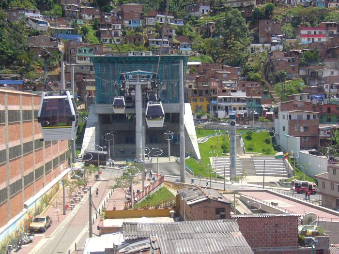 Linea K o Metrocable, Medellín (Colombia)